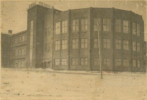 Здание клуба имени Ленина. г. Сталино, Ларинская сторона